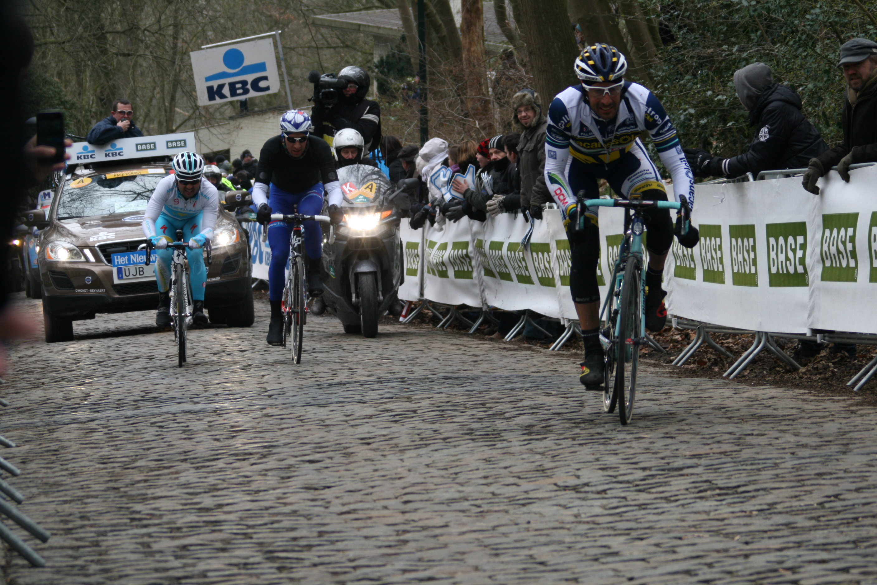 Gent-Wevelgem 2013, Kemmelberg